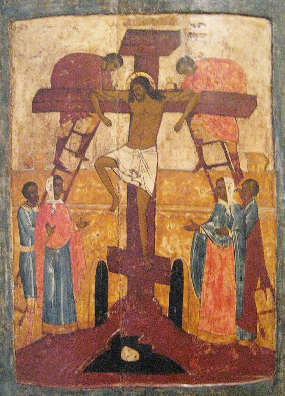 Возведение на крест. Raising to the crucifiction.